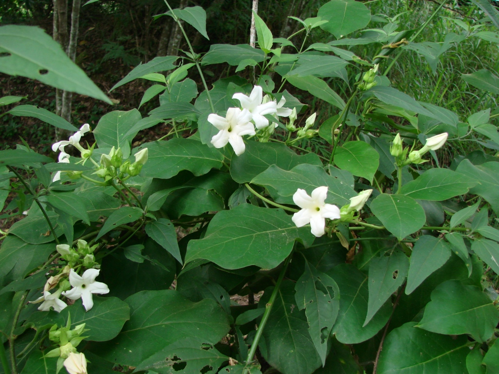 Schubertia grandiflora - APOCYNACEAE - Parque Olhos D'Água - Brasília - Distrito Federal - Brasil.